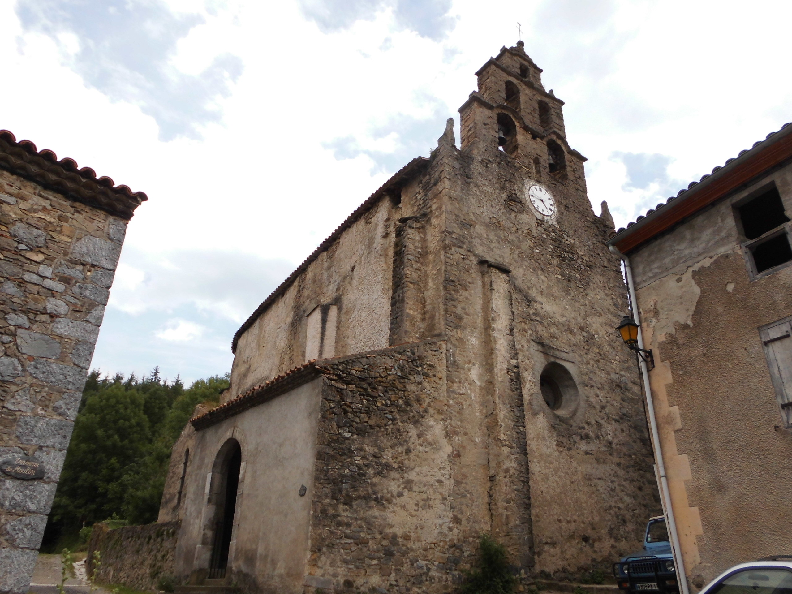 Església parroquial (Marsan)